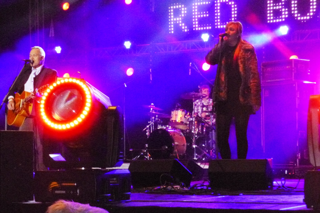 Red Box, Warszawa, 2013-12-06